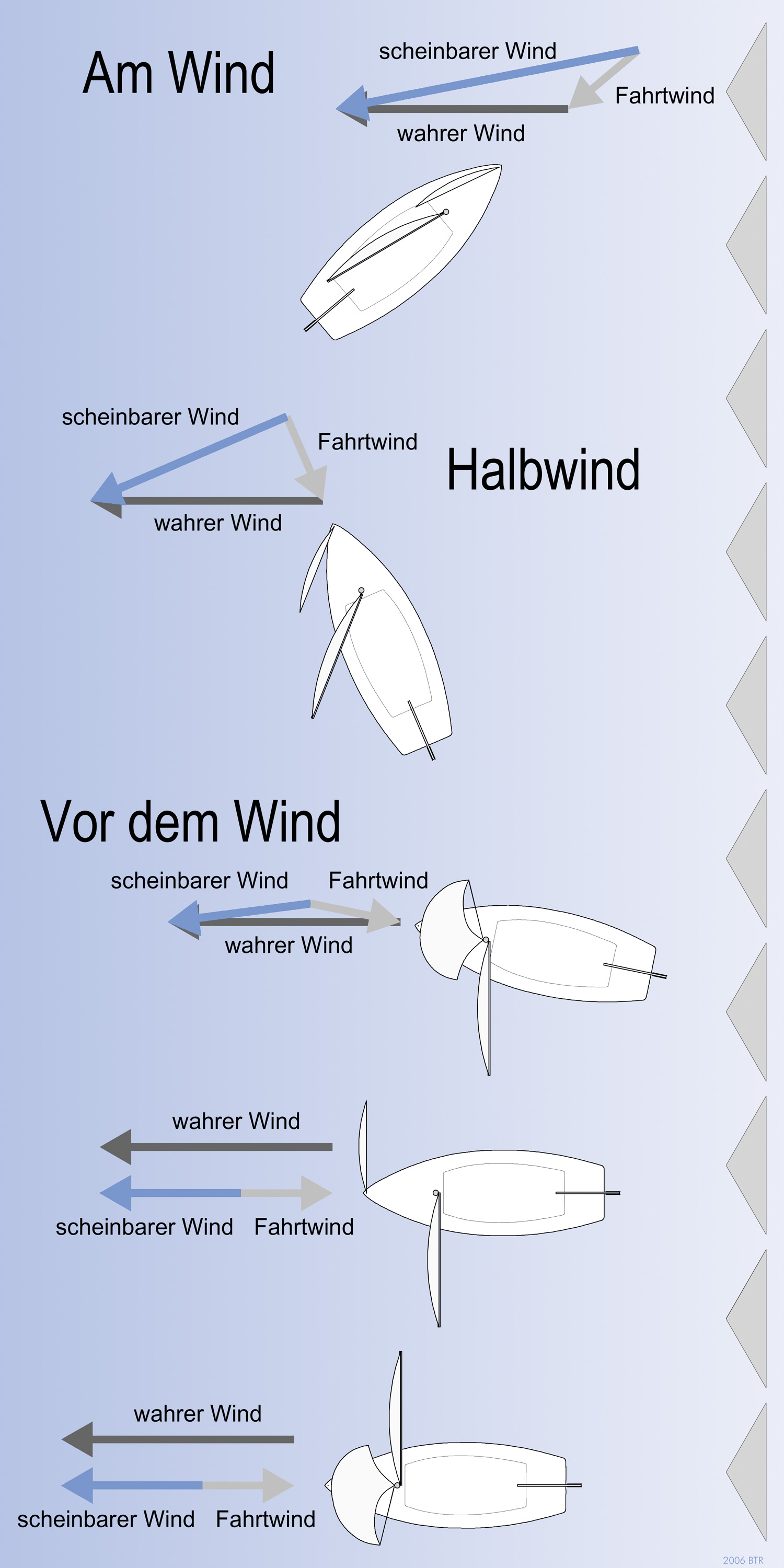 Wahrer Wind, Fahrtwind, Scheinbarer Wind